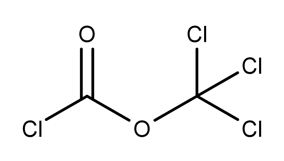 Estrutura molecular do Triclometil cloroformato